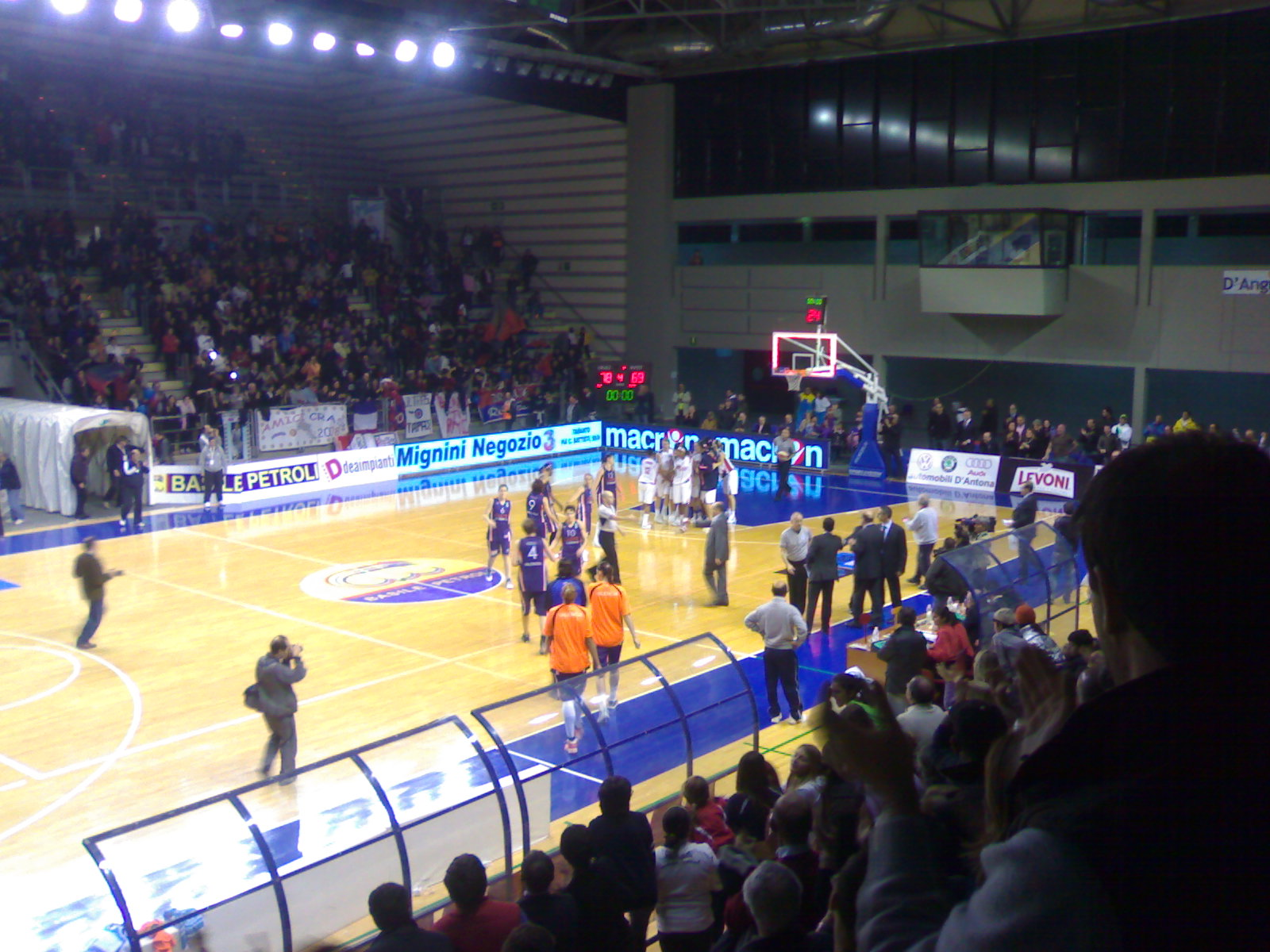 Partita al Palamazzola.